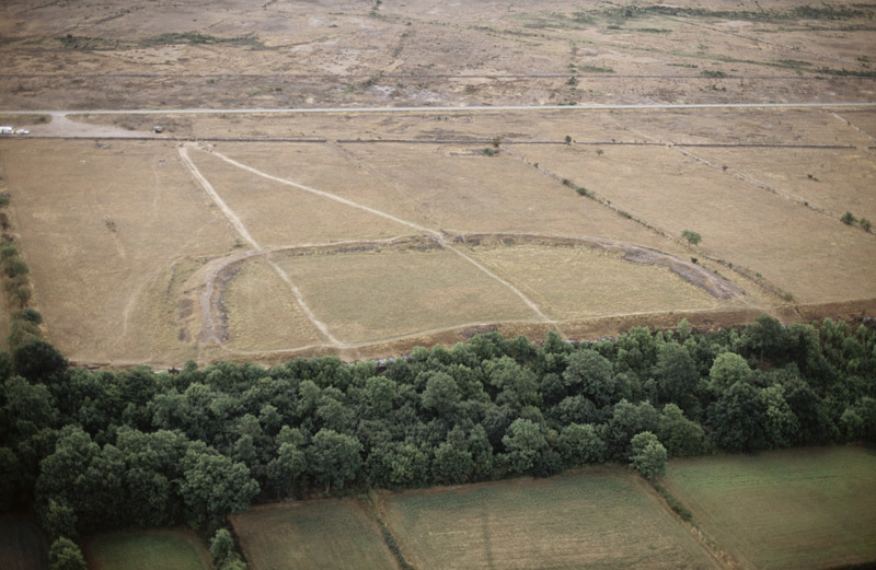 Bårby borg RAÄnr Mörbylånga 17:1. Bilden är tagen mot (väderstreck): OSO Motiv: Mörbylånga 17:1 Nyckelord: Flygbilder, Riksintressen, Världsarv Kategori: Fornborg Bårby borg RAÄnr Mörbylånga 17:1. Bilden är tagen mot (väderstreck): OSO. Mörbylånga 17:1.